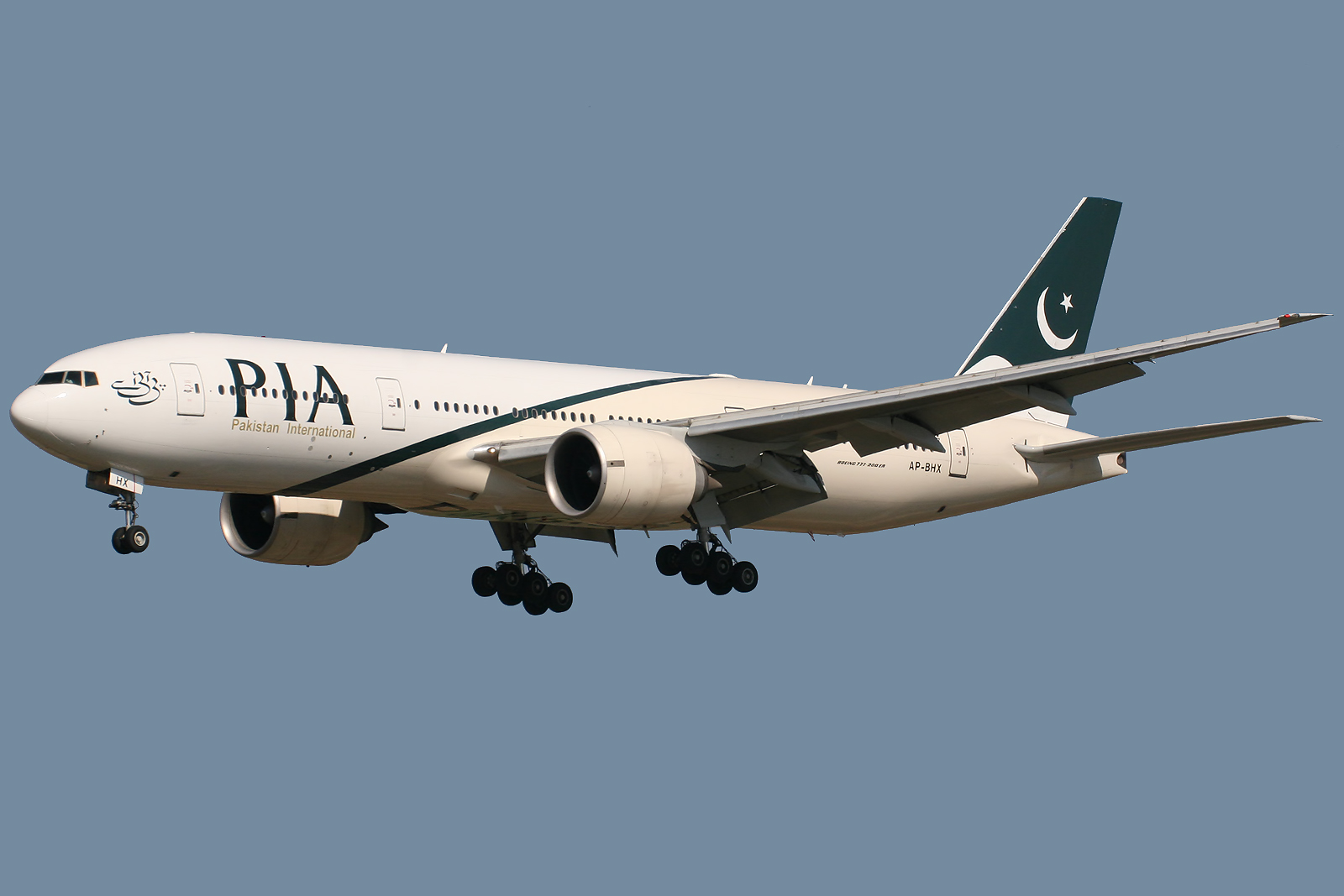 Barcelona El Prat (LEBL/BCN) Airport